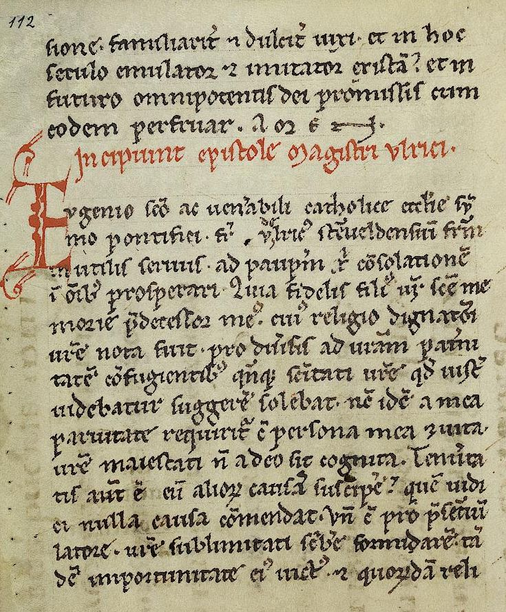 Beginn der Briefsammlung des Propstes Ulrich von Steinfeld, Martinus-Bibliothek Mainz, Hs. 42, S. 112